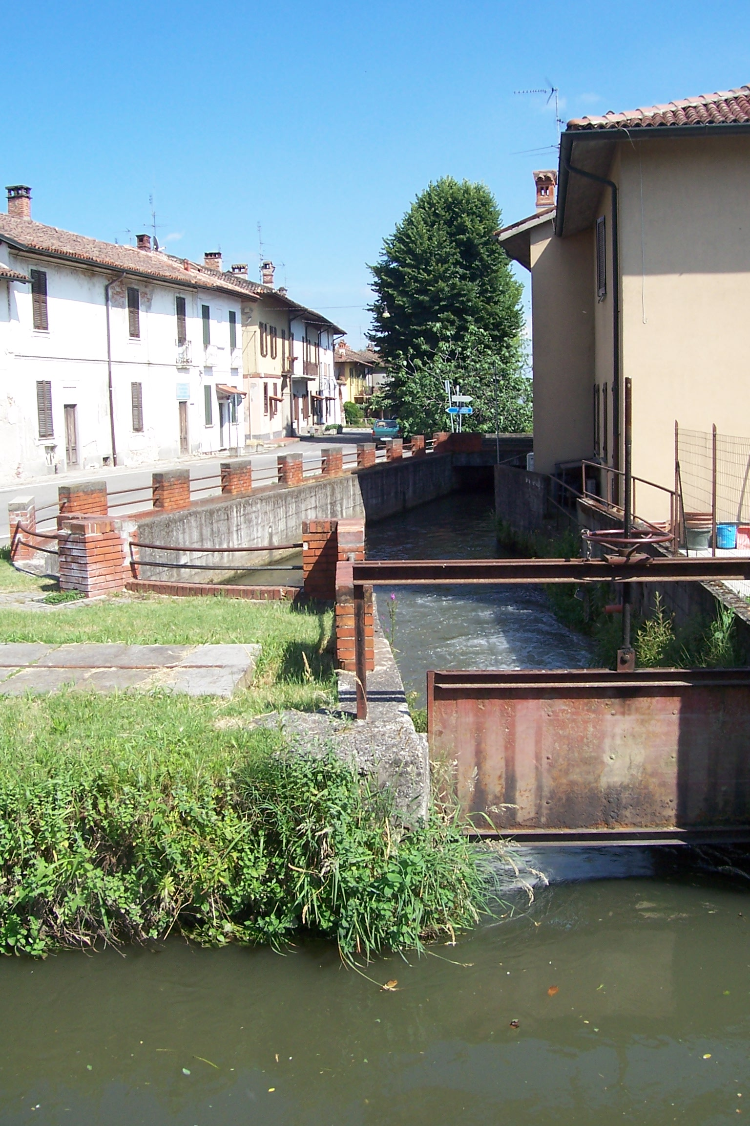 Bereguardo Dalla fine del Naviglio, l'Una Roggia scende al Ticino